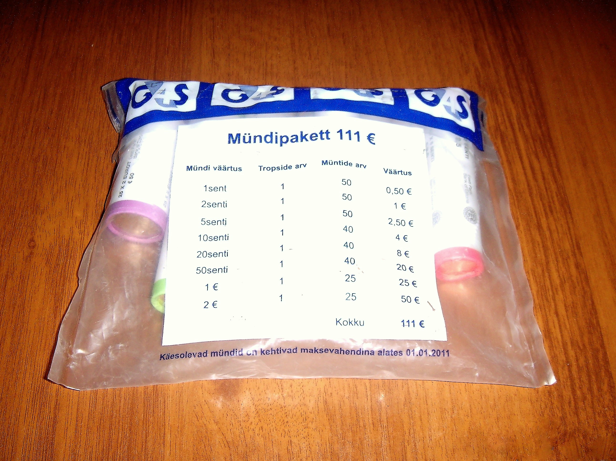 Комплект евро монет (111 евро)